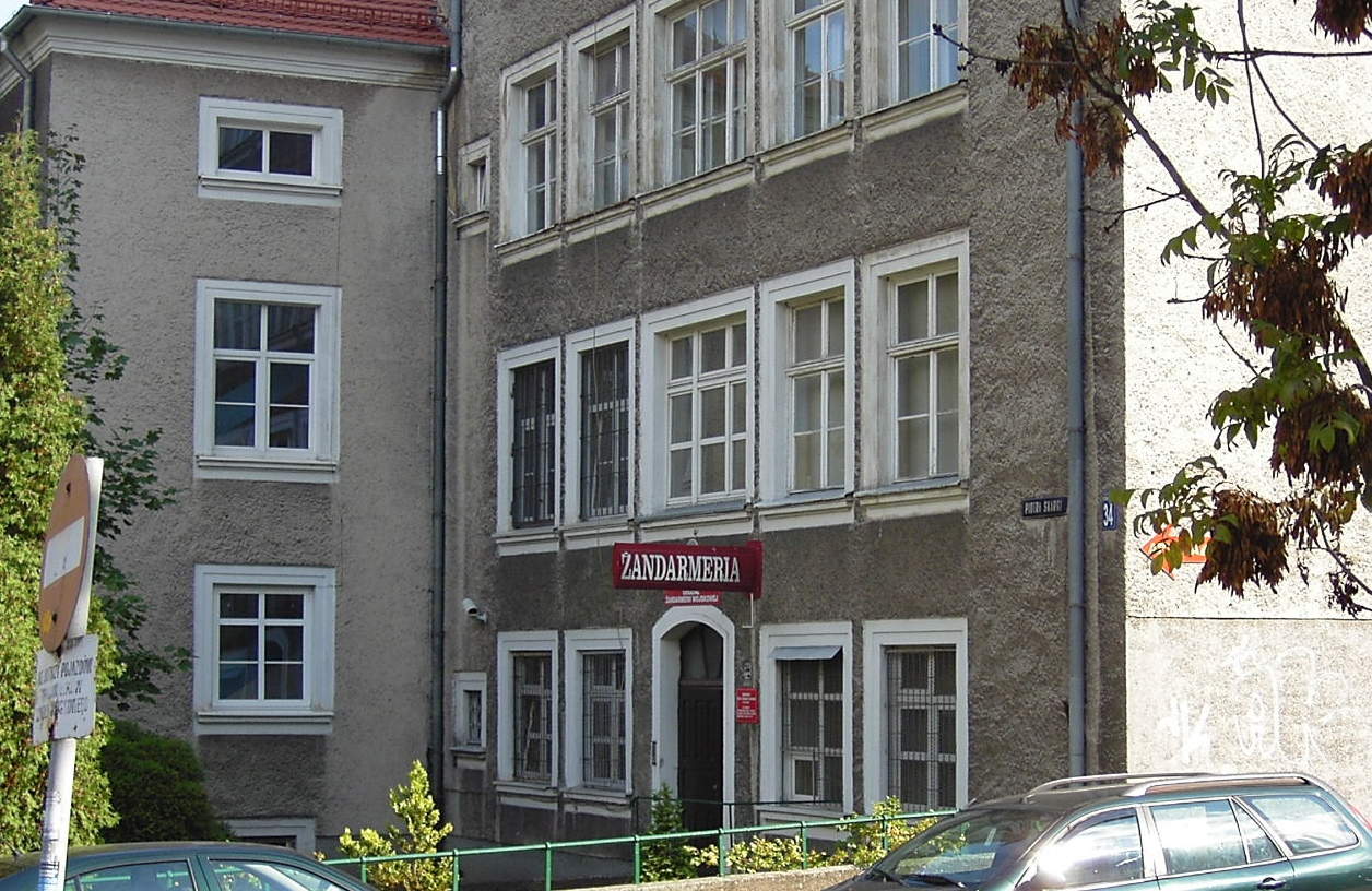 Koszary przy ulicy Piotra Skargi